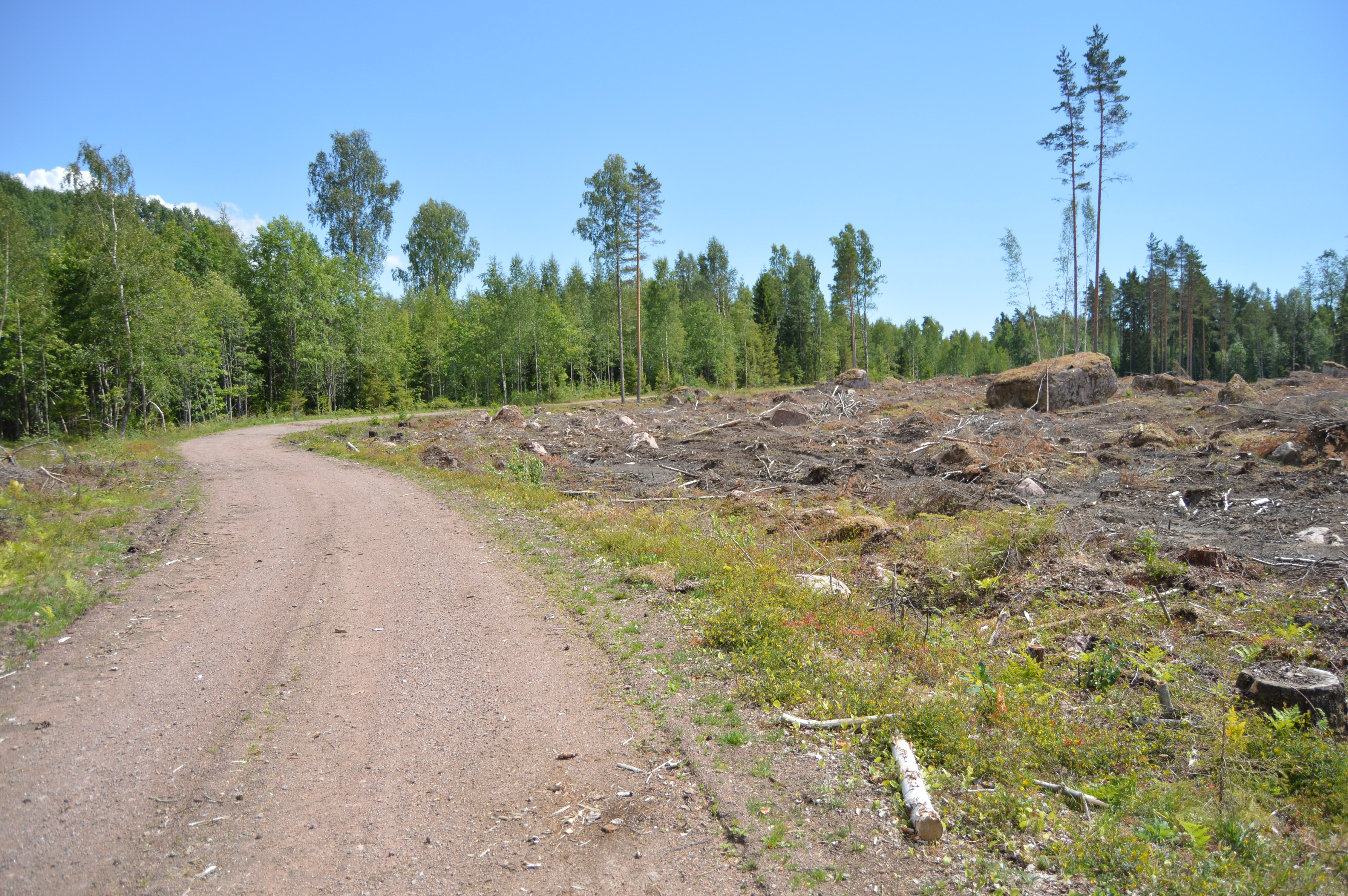 Historiallisen Kuninkaantien pätkä Summassa Helsingintien pohjoispuolella